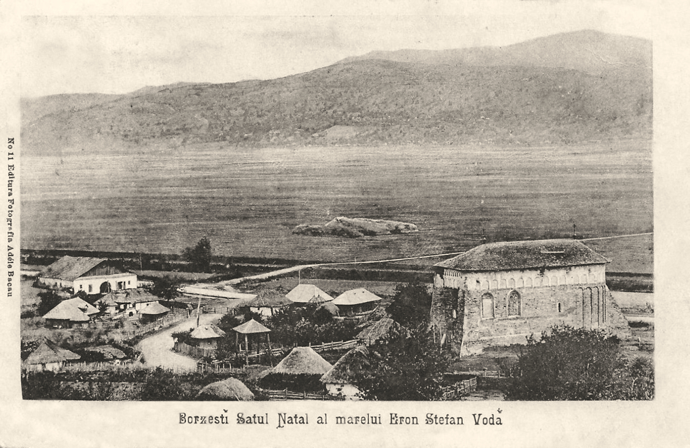 Satul Borzești, județul Bacău în anul 1904. În prim-plan Biserica cu hramul „Adormirea Maicii Domnului”, construită între 1493-1494.